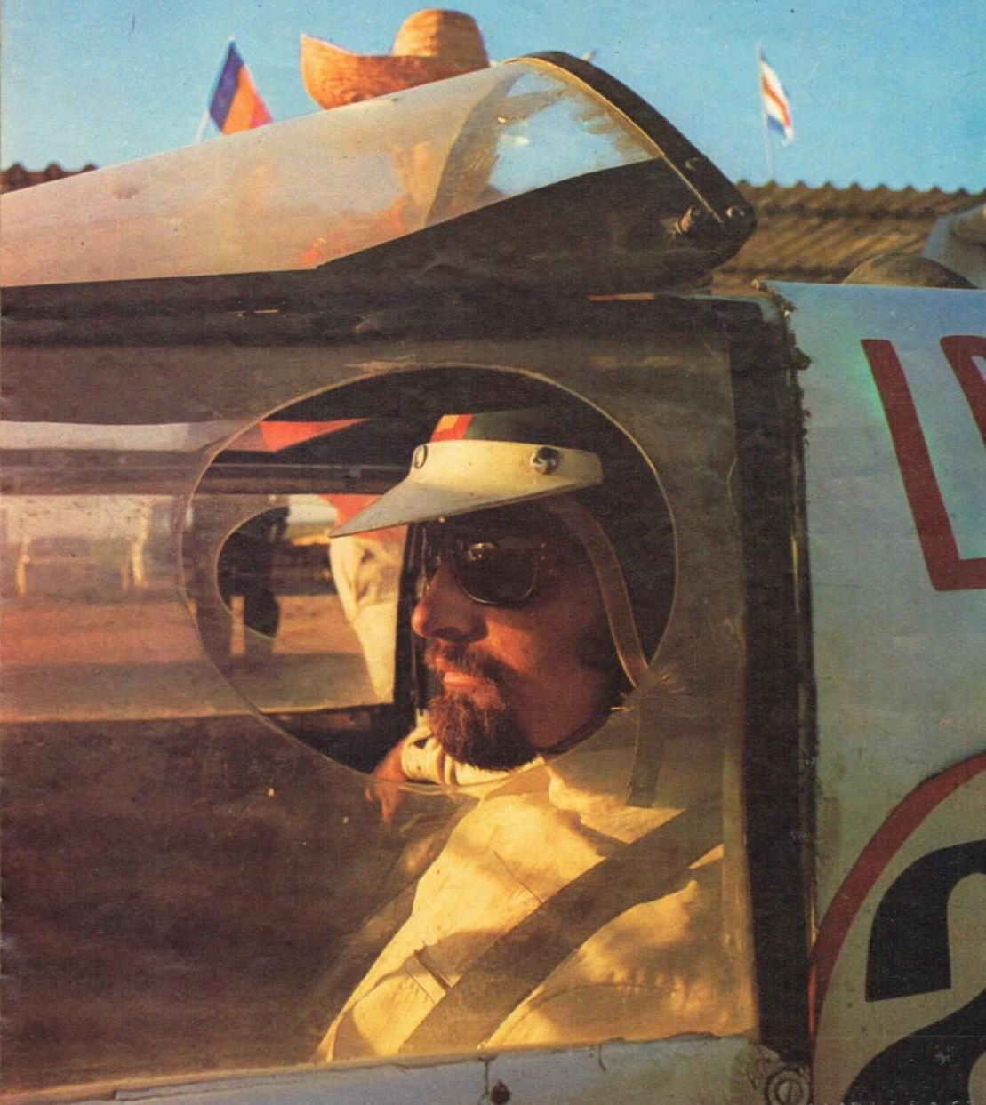 Revista Automundo Nº 241 del 16 de diciembre de 1969. Carlos Ruesch sobre su Numa-Tornado de la temporada 1969 de Sport Prototipo Argentino.